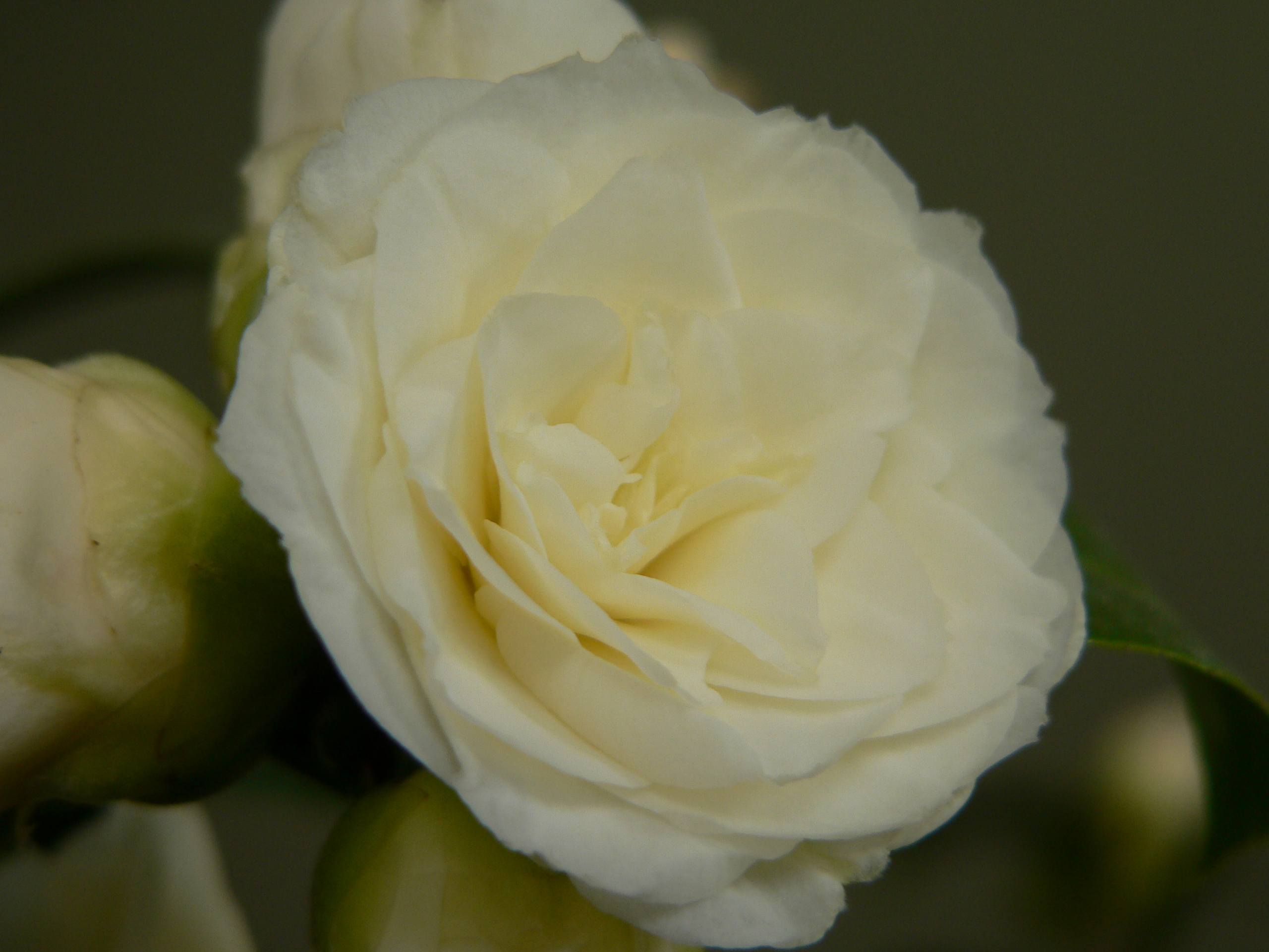 Camellia japonica